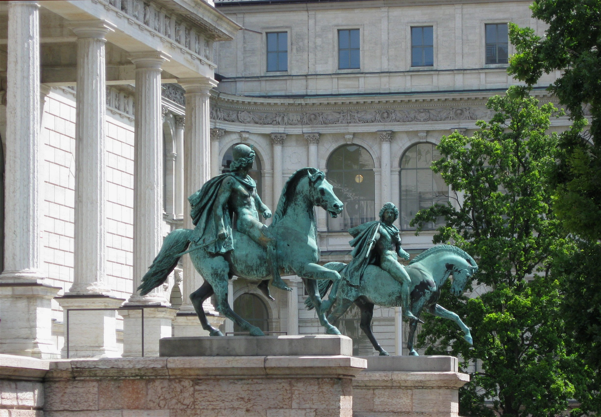 Akademie der Bildenden Künste in München, Bronze-Reiterfiguren Castor und Pollux von Max von Widnmann